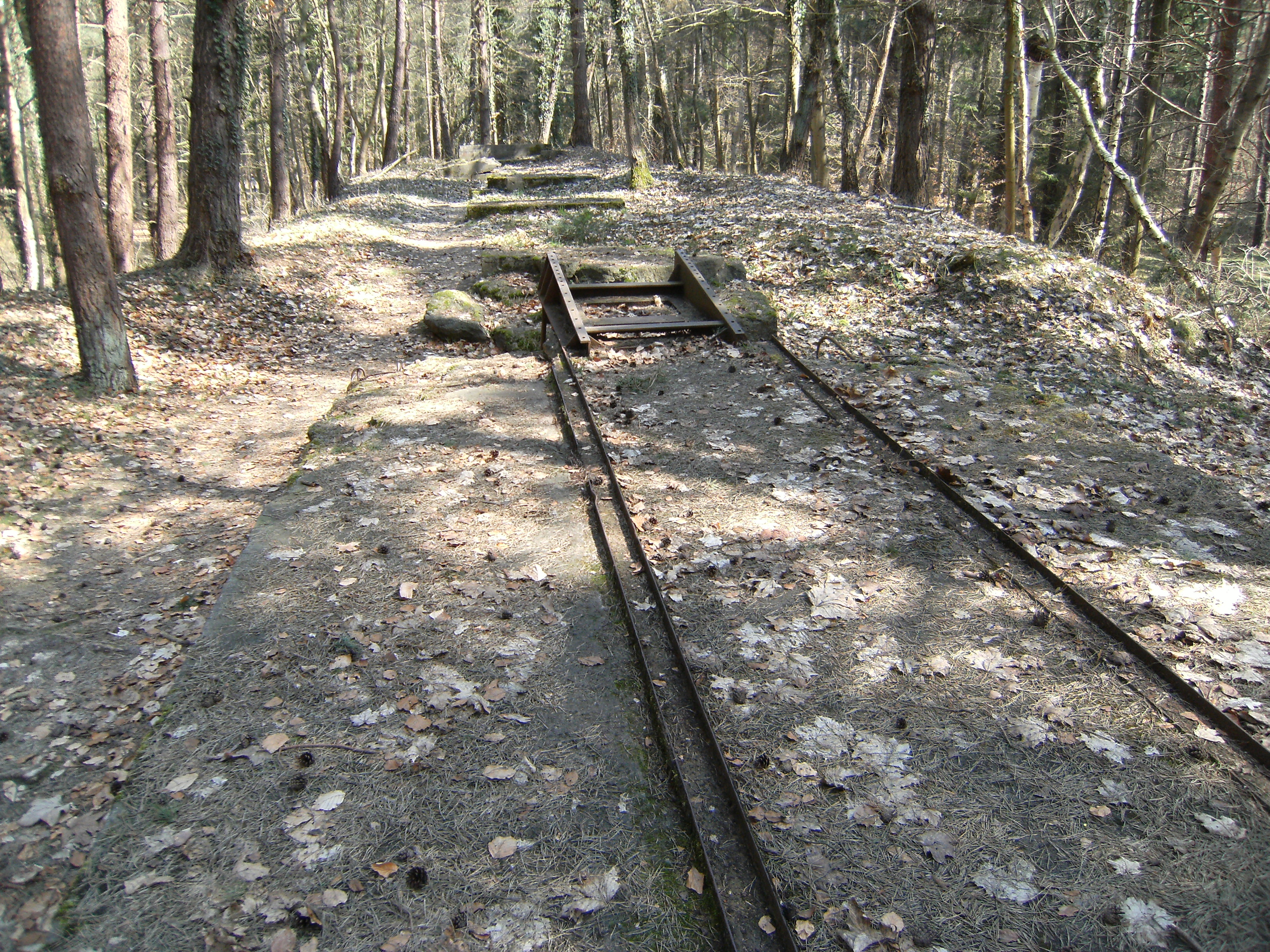 Relikte der V1-Startrampe der Feldstellung II, Zempin